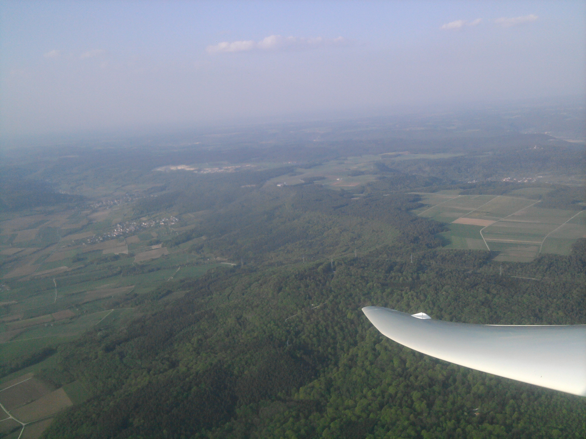 Luftbild Lange Meile von Südwesten